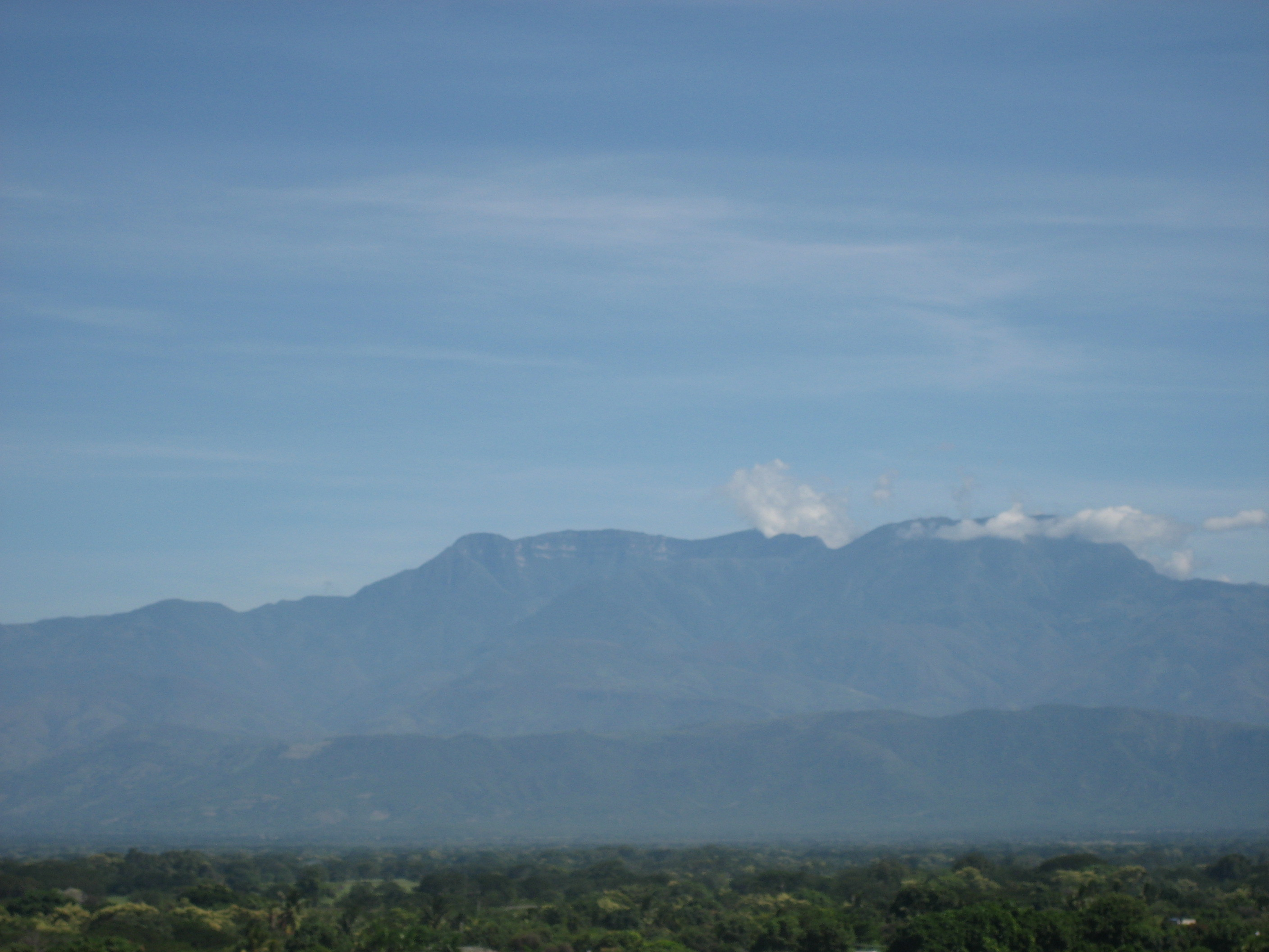 Cerro Pintao - Serrania del Perija, Venezuela.